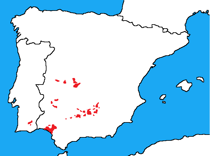 Huidige verspreiding van de Pardellynx, in het rood weergeven